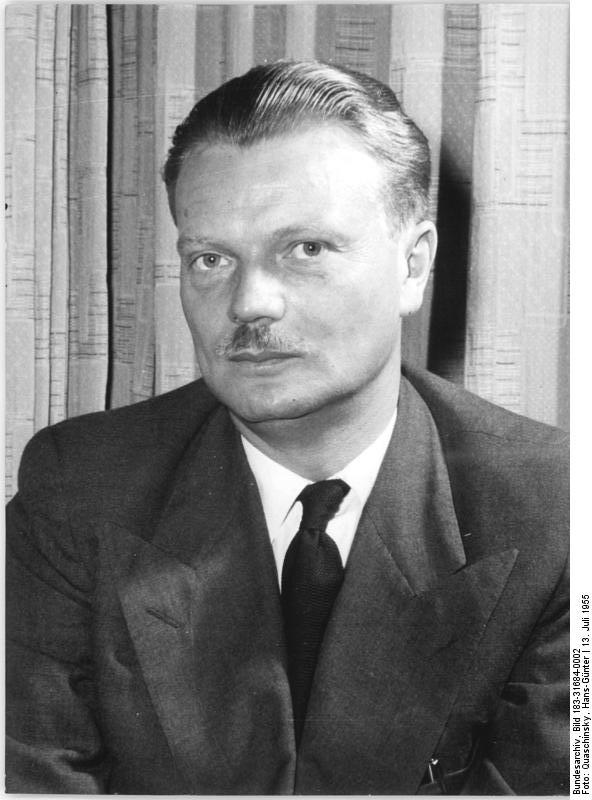 Zentralbild Schw.Quasch.- 13.7.1955 - B. Piasocki, Vorsitzender der PAX-Gruppe in Warschau.